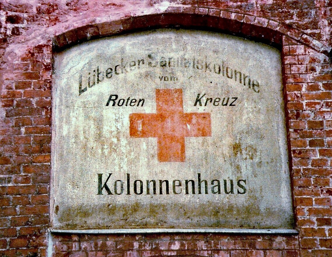 Einstiges Haus der Lübecker Sanitätskolonne